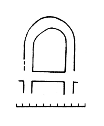 Царква-на-рове, план